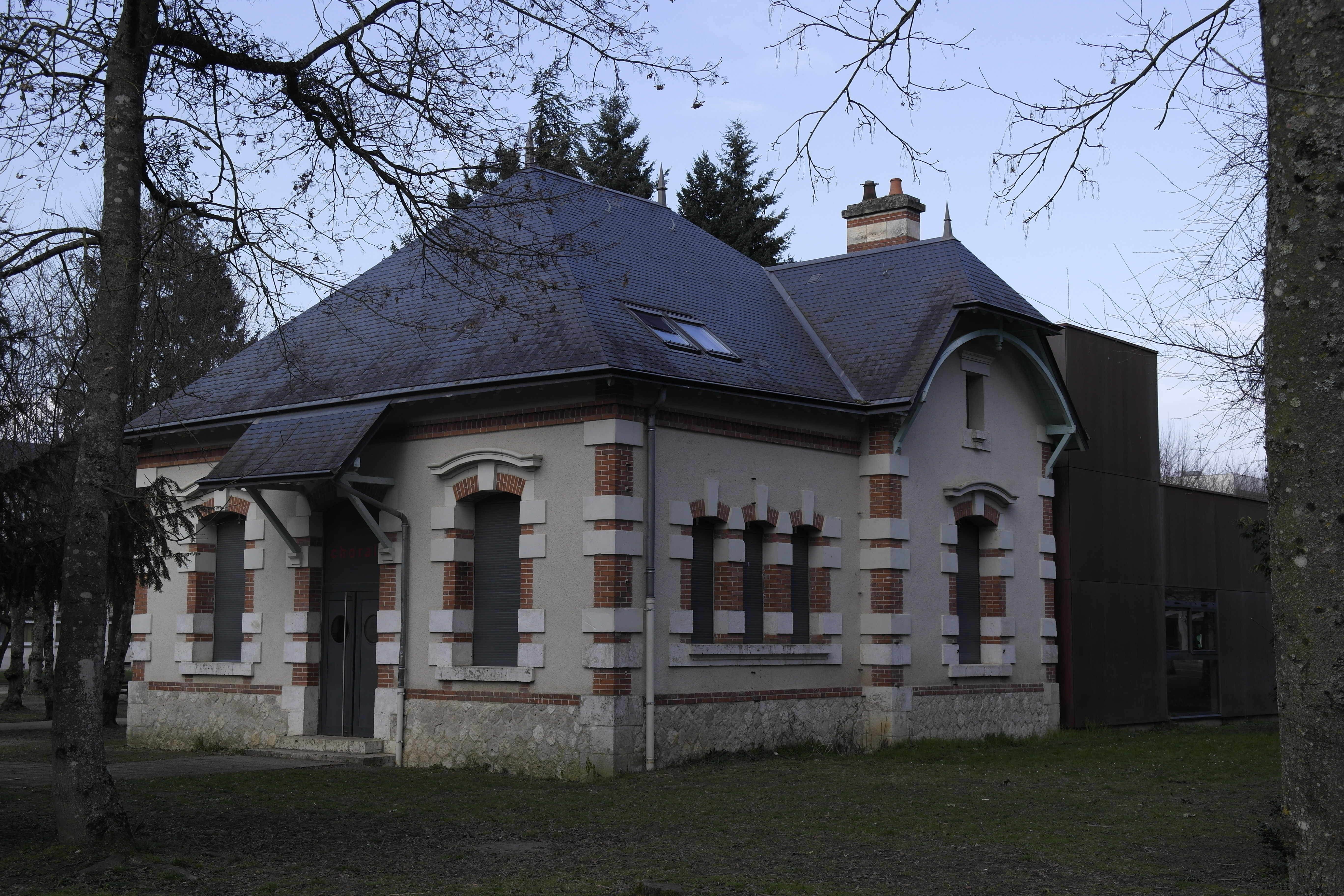 Partie ancienne de la Maison des Lycéens (MDL) du lycée Augustin-Thierry. Du temps de l'hospice Lunier, elle était appelée "Les Glaïeuls".